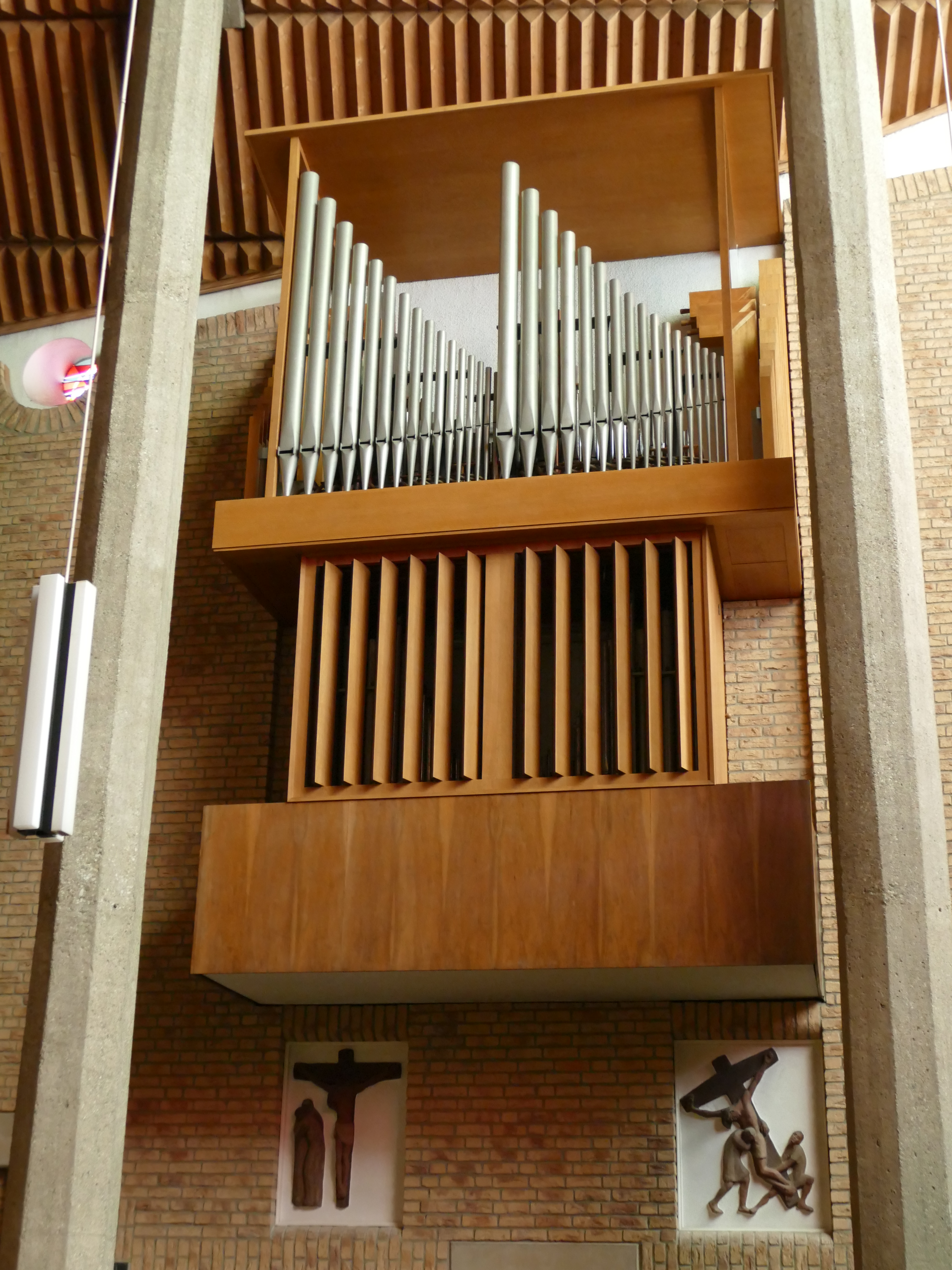 Orgelpfeifen der Ochtendunger Kirchenorgel